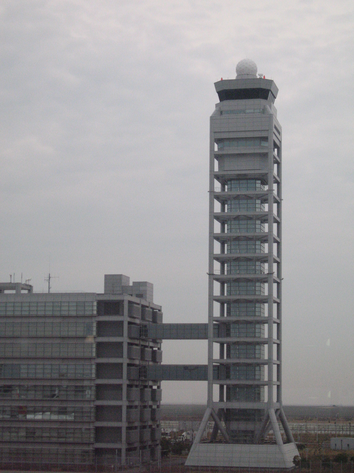 Kansai International Airport, Osaka, Kansai Region.